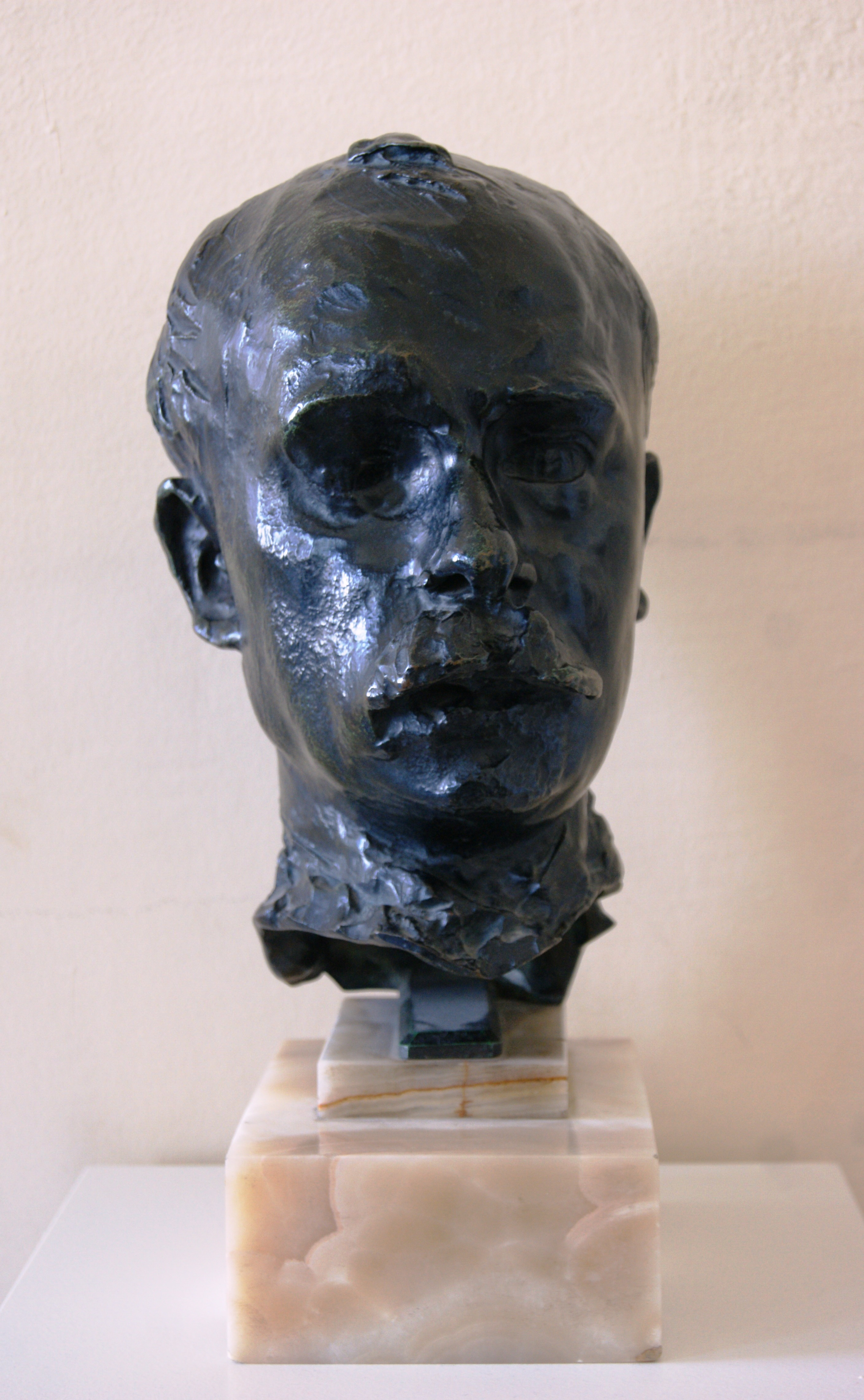 Musée Rodin Bronze - Octave Mirbeau